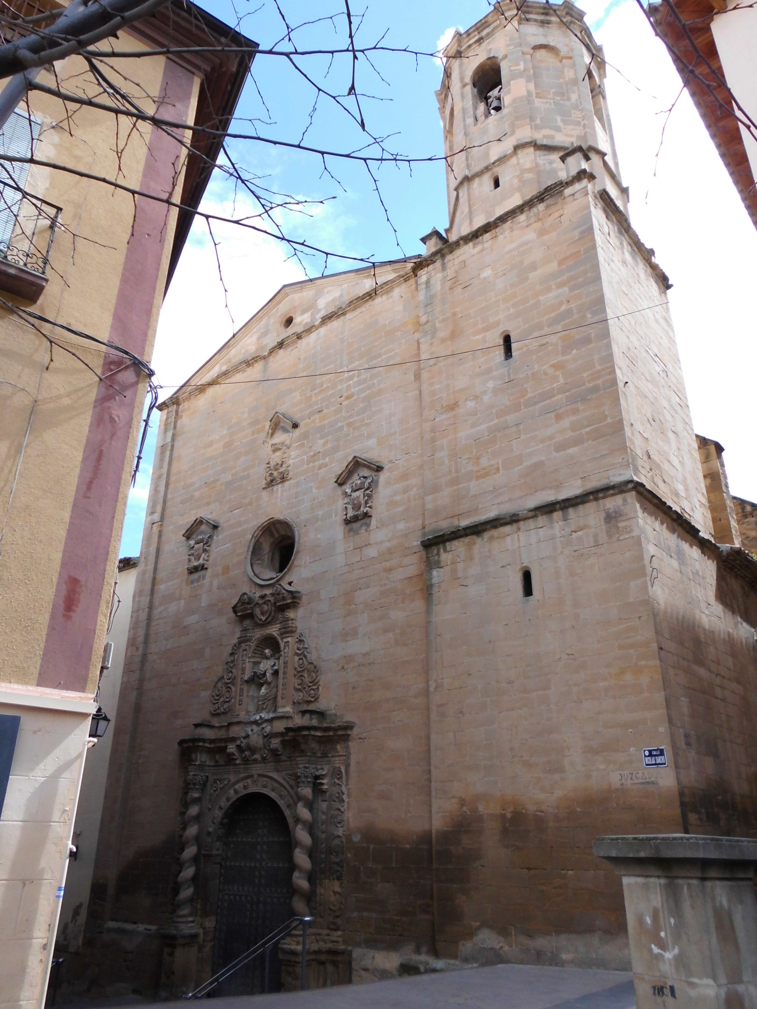 Església del Carme (Alcanyís)